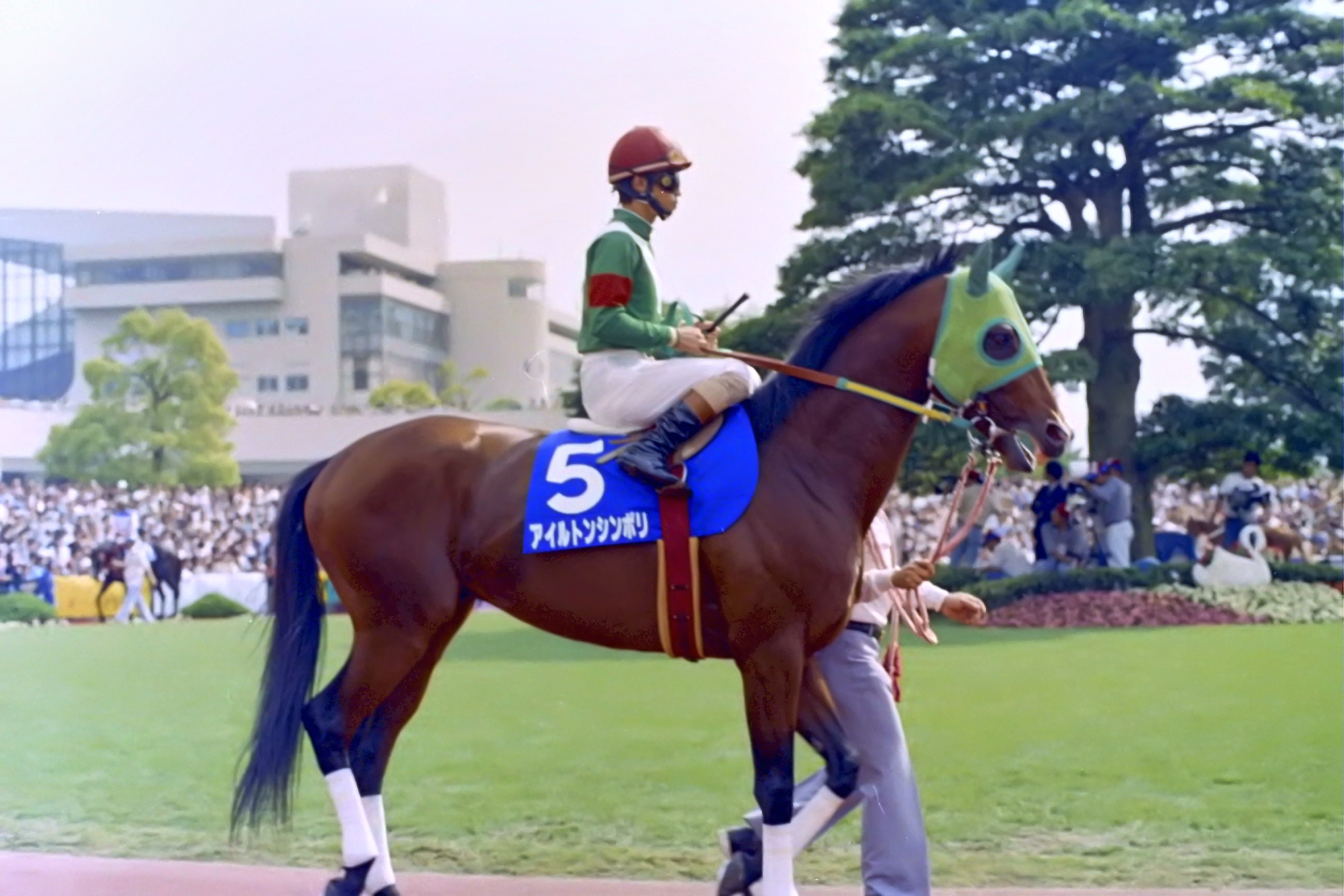 アイルトンシンボリ 1995年6月4日 京都競馬場